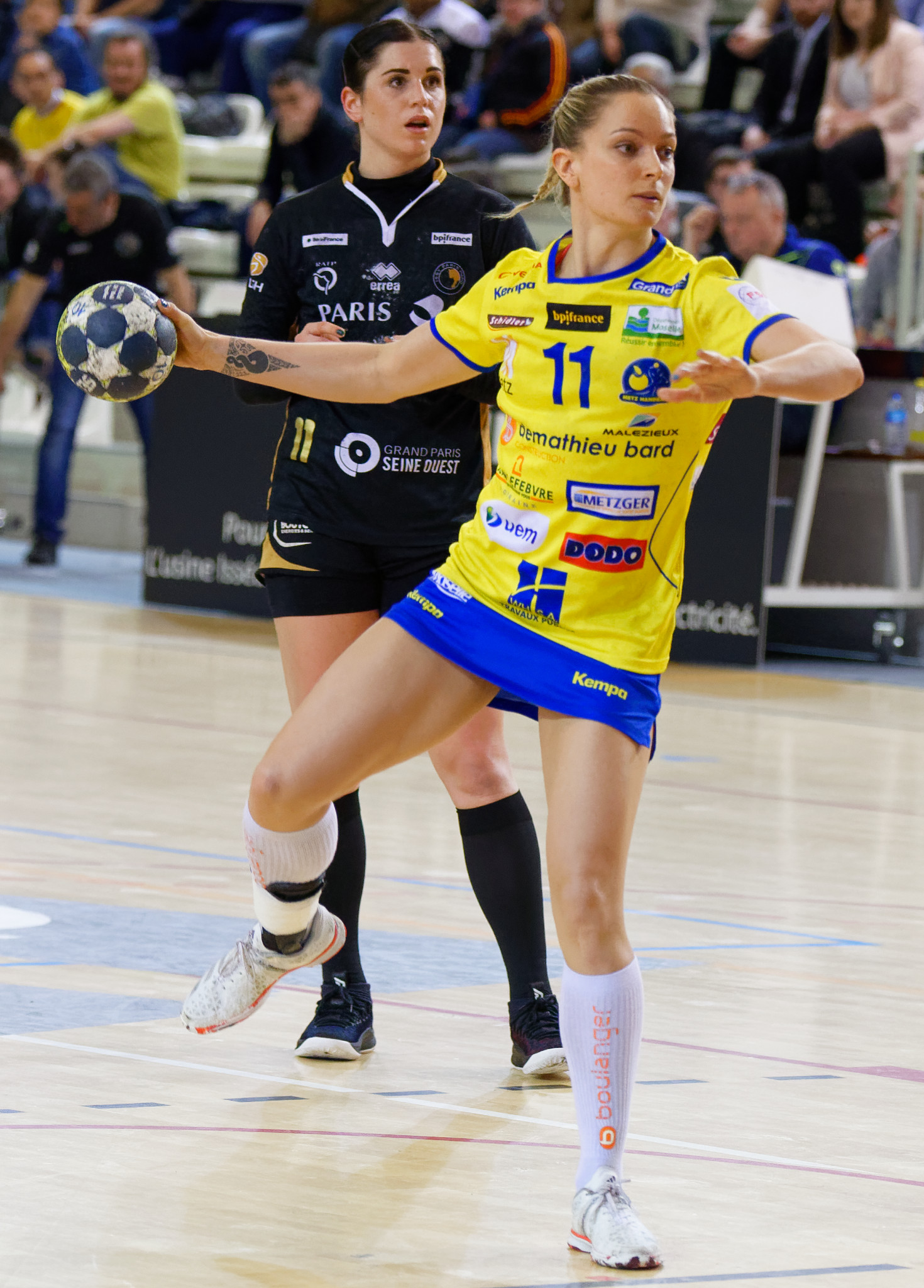 Manon Houette lors de Issy Paris / Metz Handball. Le 14 mars 2018.